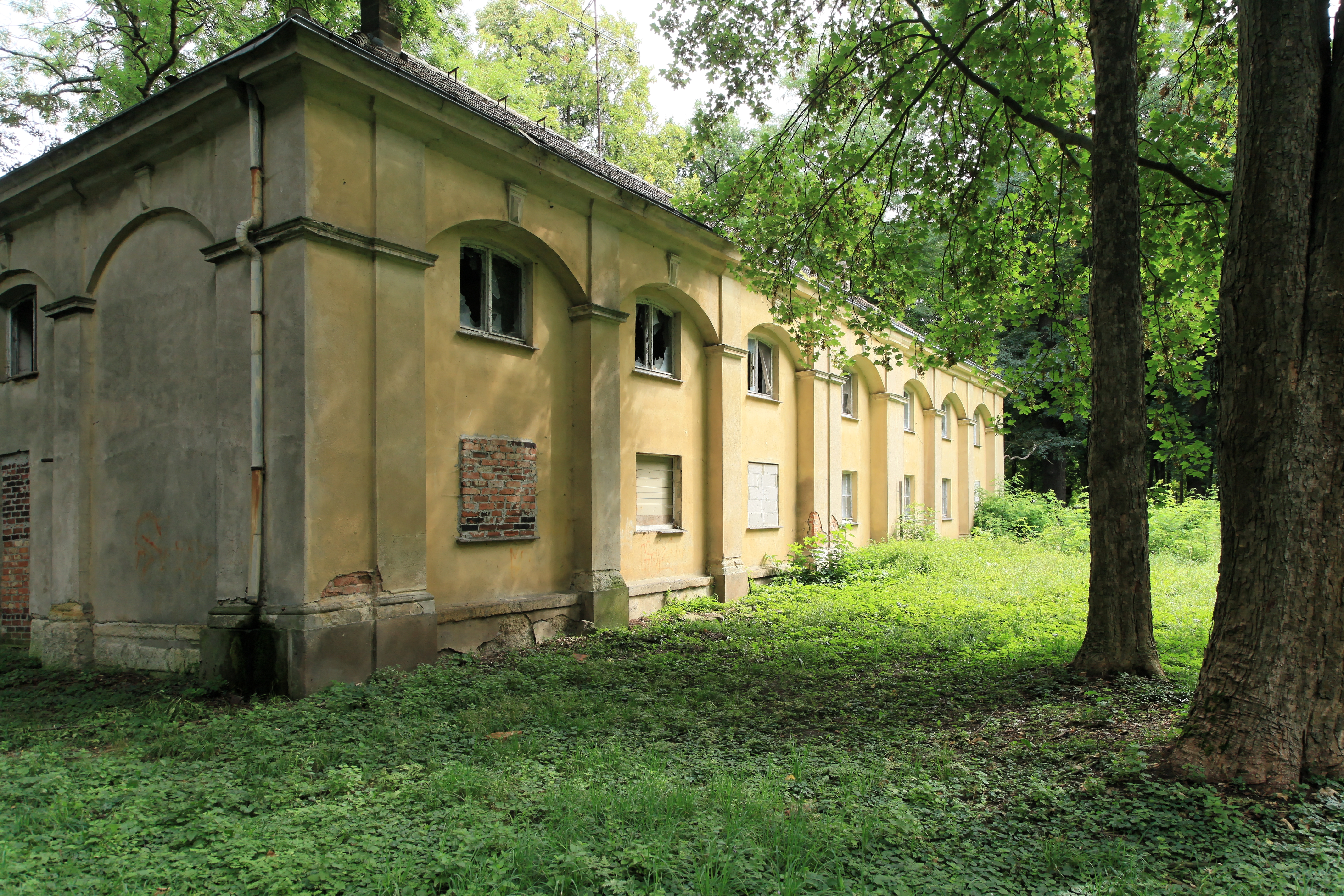 Orangerie, Schlosspark Schönwölkau, Kirchplatz in Wölkau, Schönwölkau